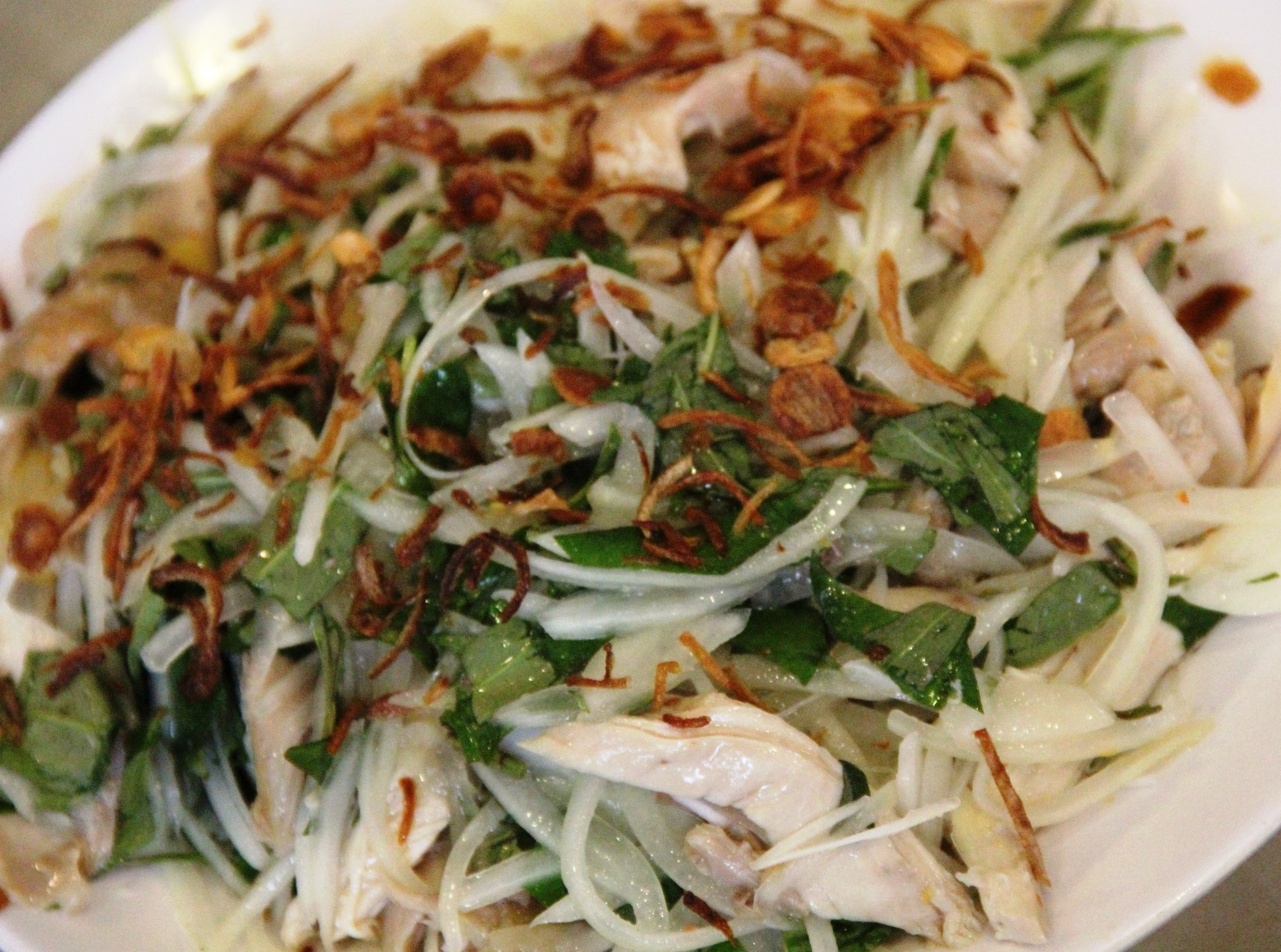 Gà bóp rau răm, tháng 8 năm 2018